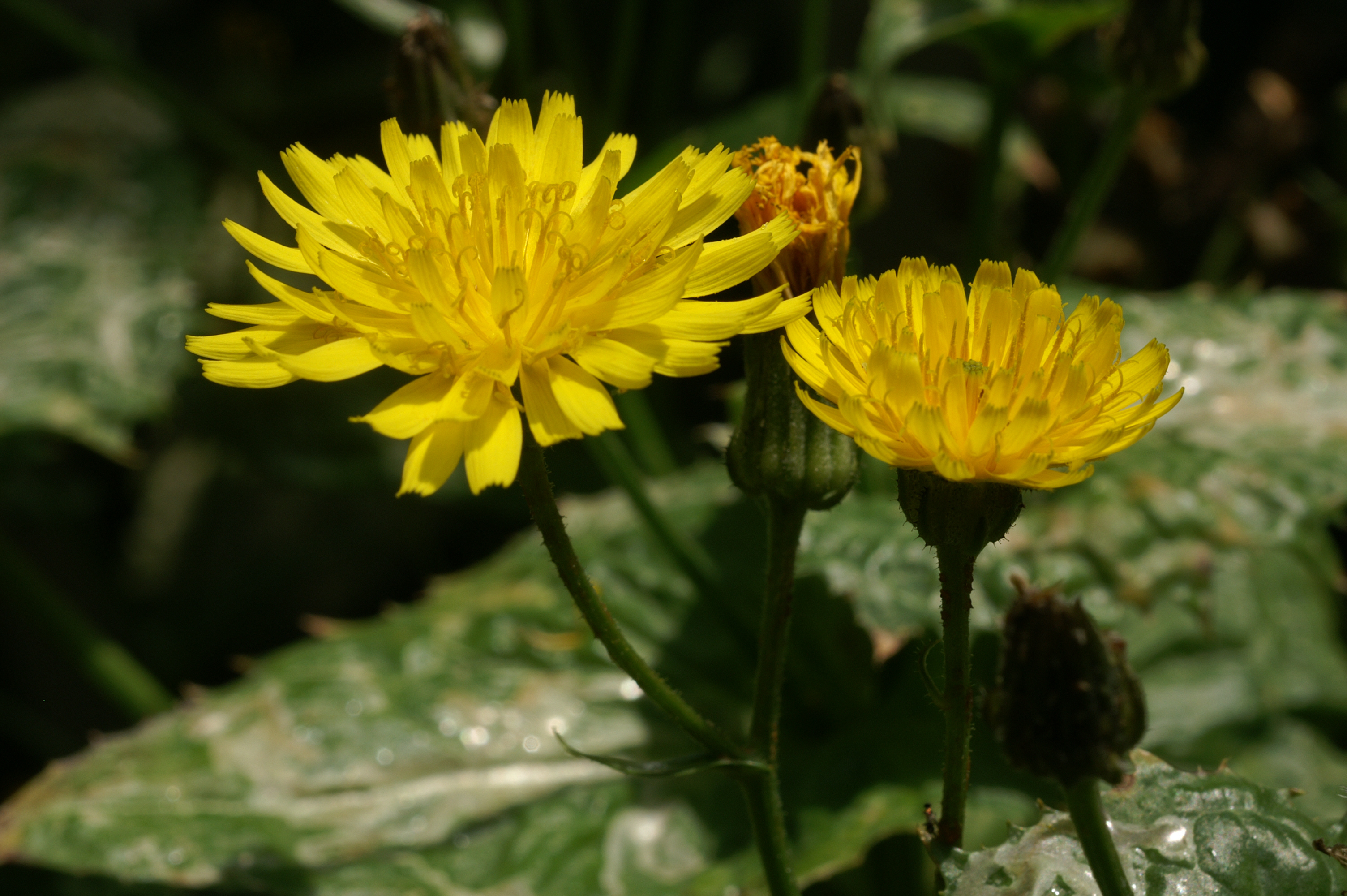 Bildgegenstand: Kanaren-Pippau (Crepis canariensis), im Botanischen Garten Berlin am 2. Juni 2006 fotografiert